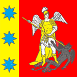 Прапор Гадяча